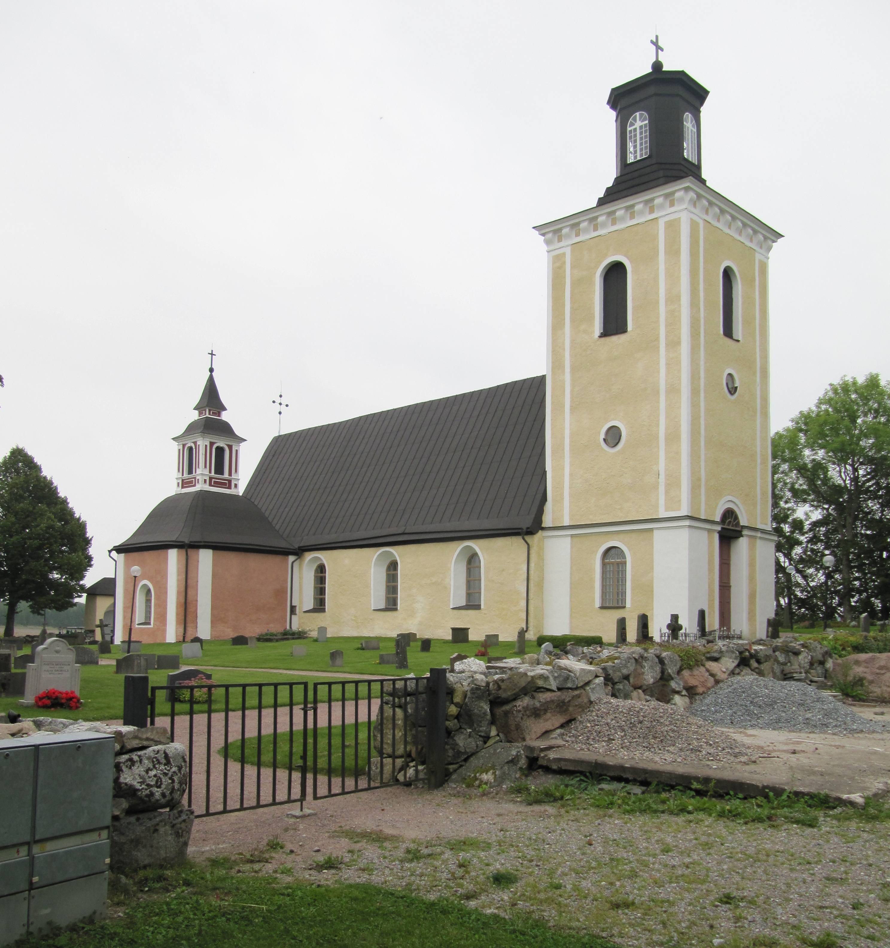 Vallby kyrka från nordväst